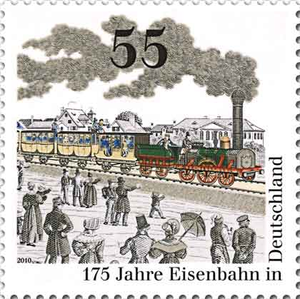 Stamp description / Briefmarkenbeschreibung